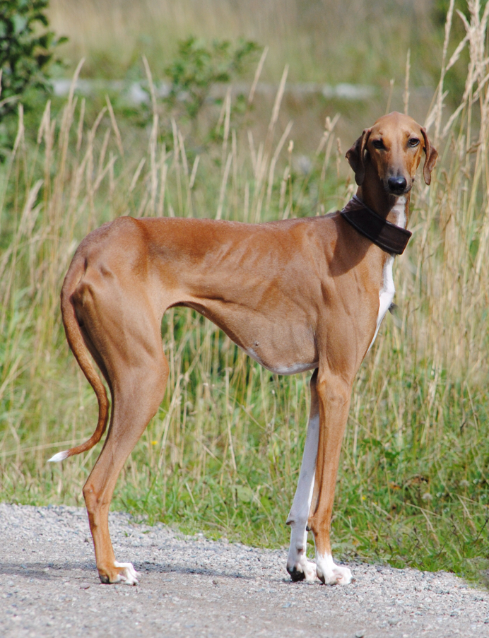 Azawakh "El-Adini Adiza"